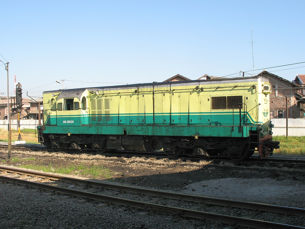 PTKABB200 (200 29 A)